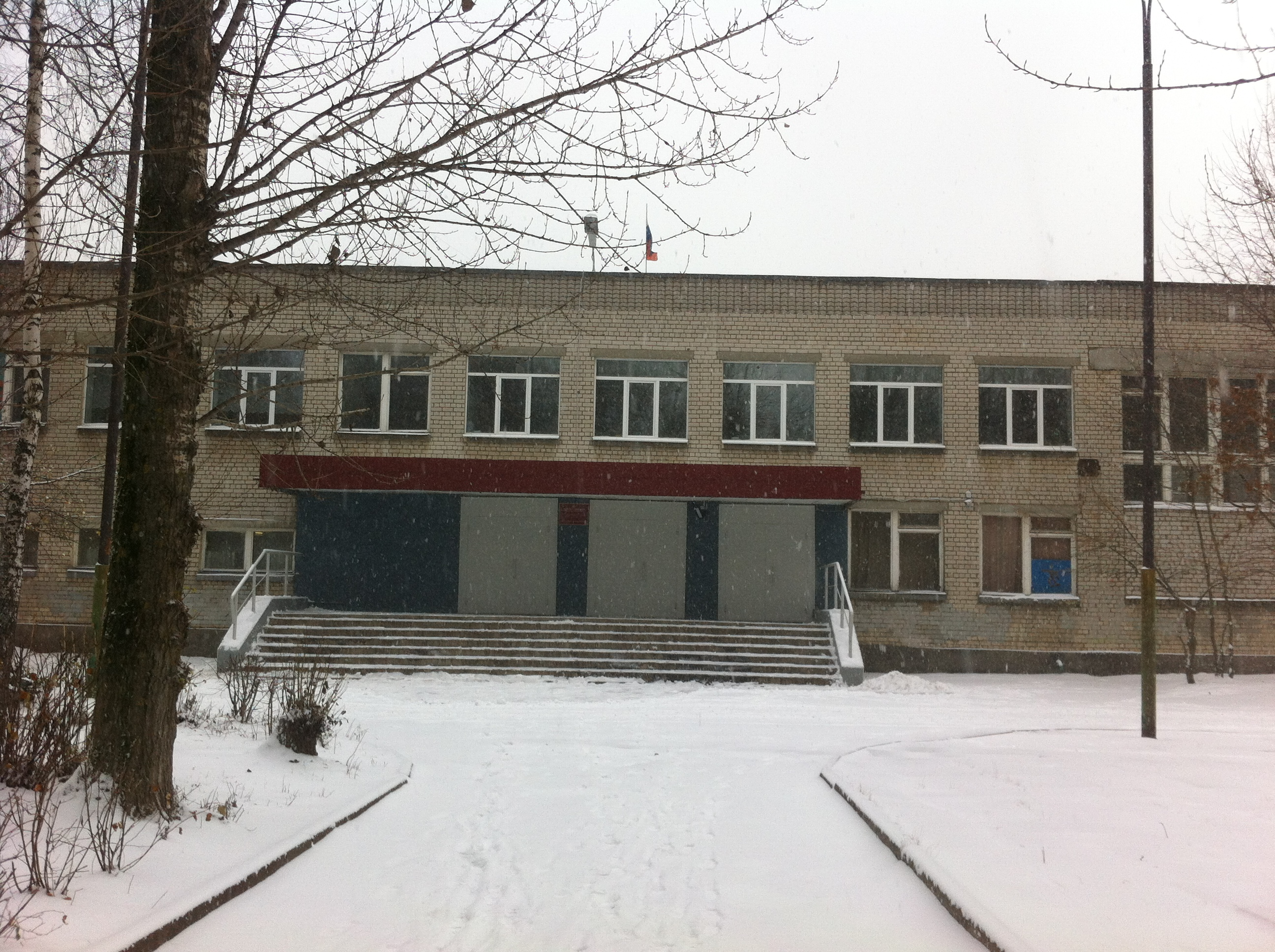 Школа 11 Ярославль